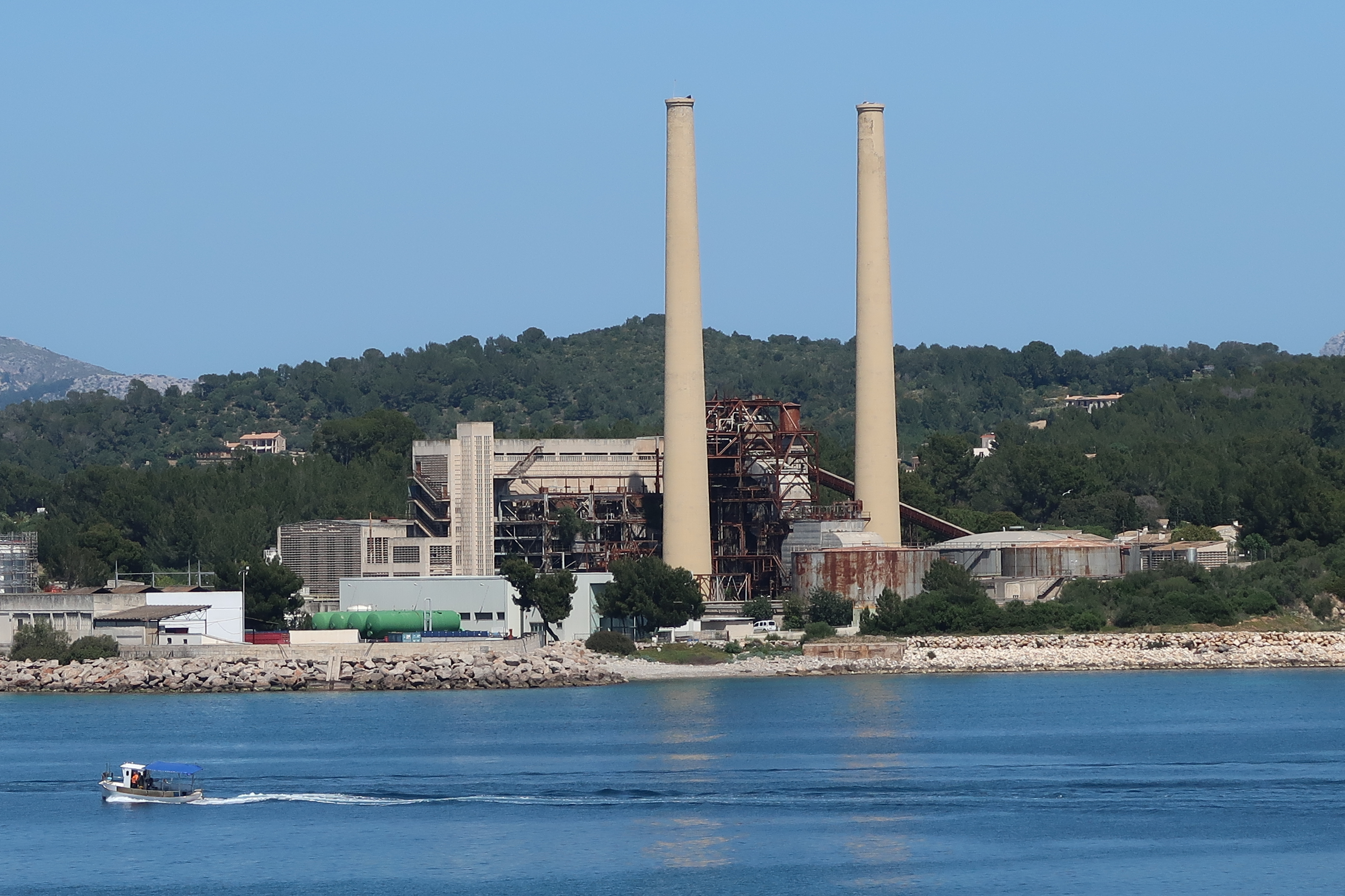 Spanien (E) - Balearische Inseln (IB) - Mallorca - Alcúdia: stillgelegtes Kohlekraftwerk (von der Seeseite fotografiert)